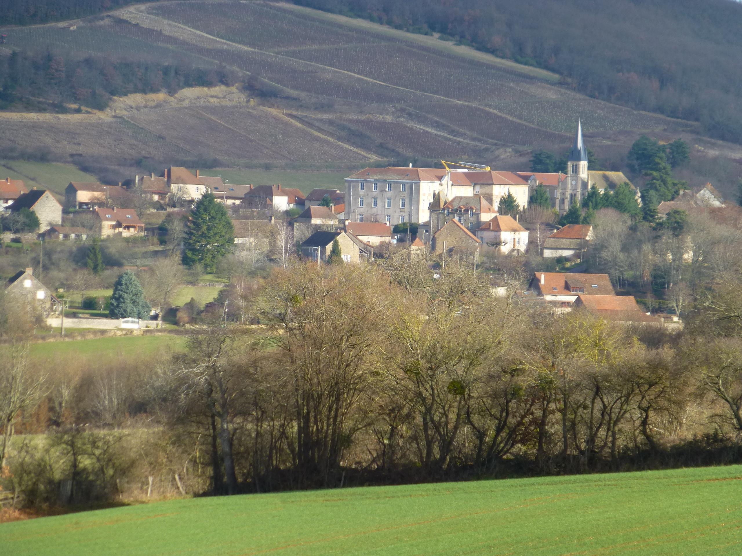 Commune de Fley, Village de Rimont vu des Chaumes